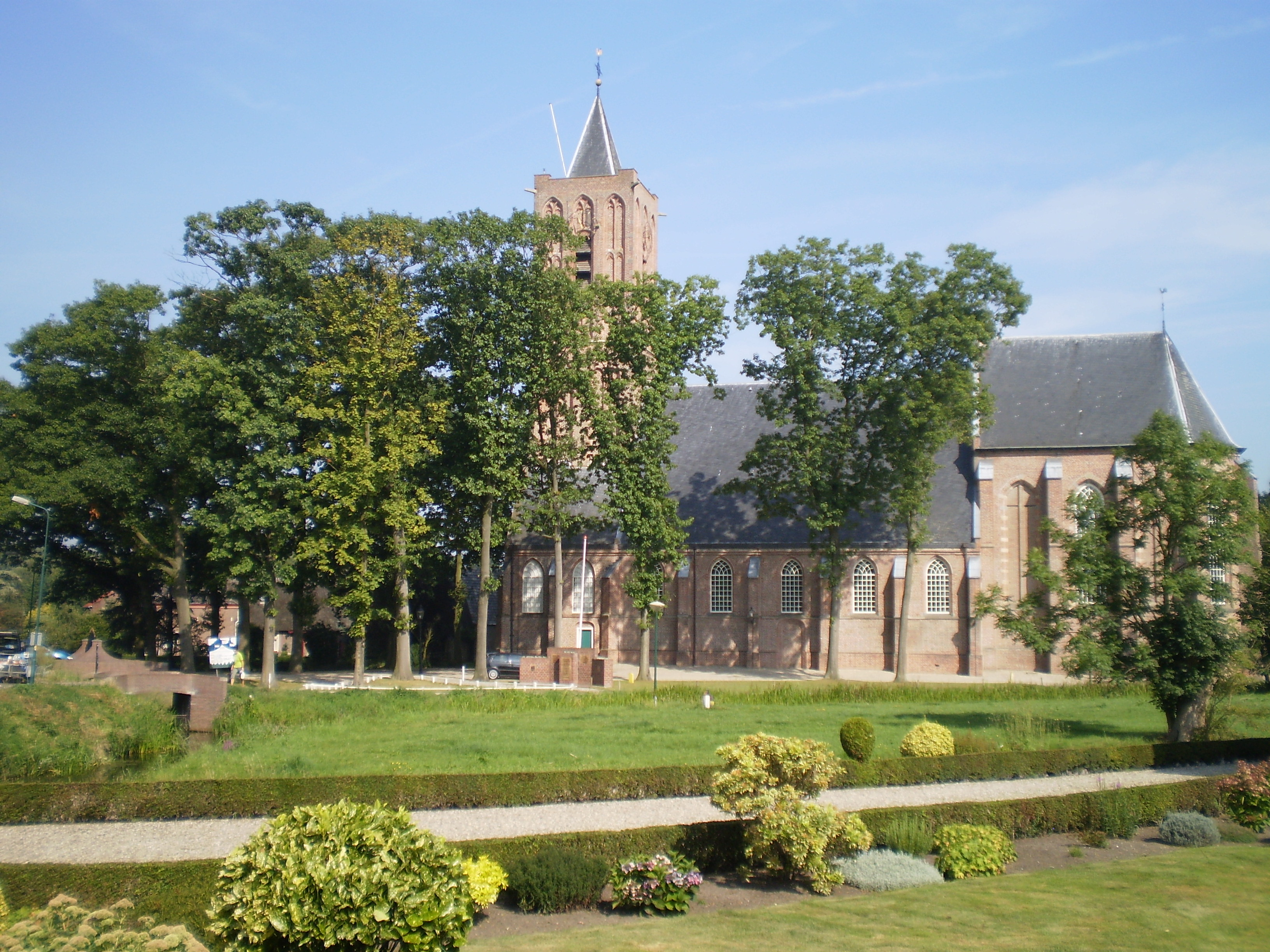 Westbroek tsjerke